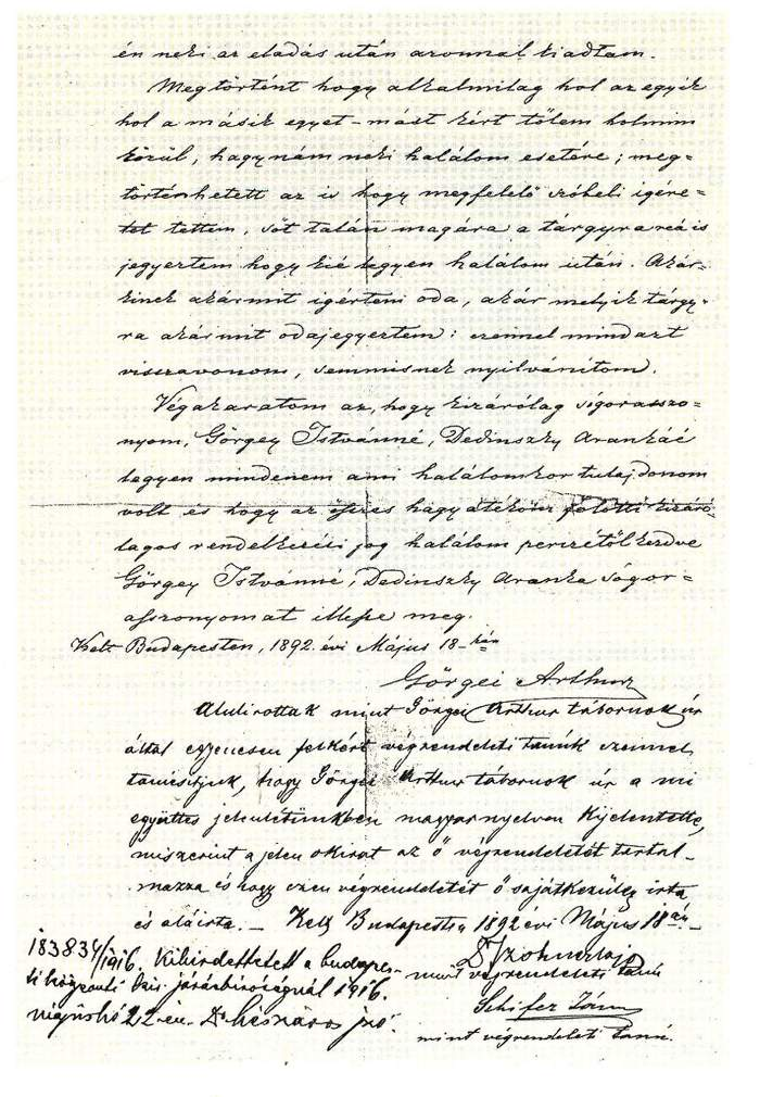 Görgei Arthur saját kezű végrendelete